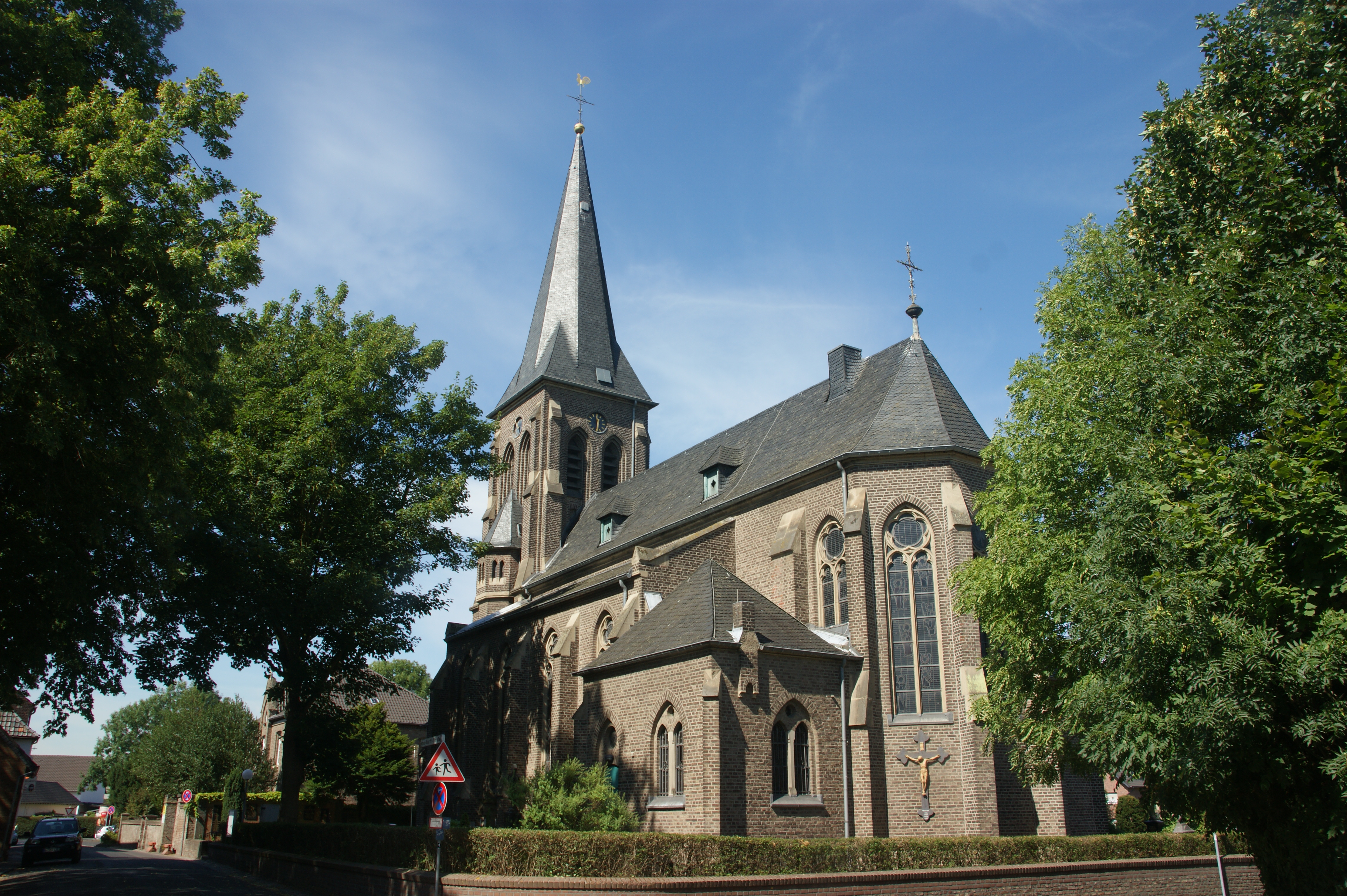 Katholische Kirche St. Cornelius in Pulheim-Geyen